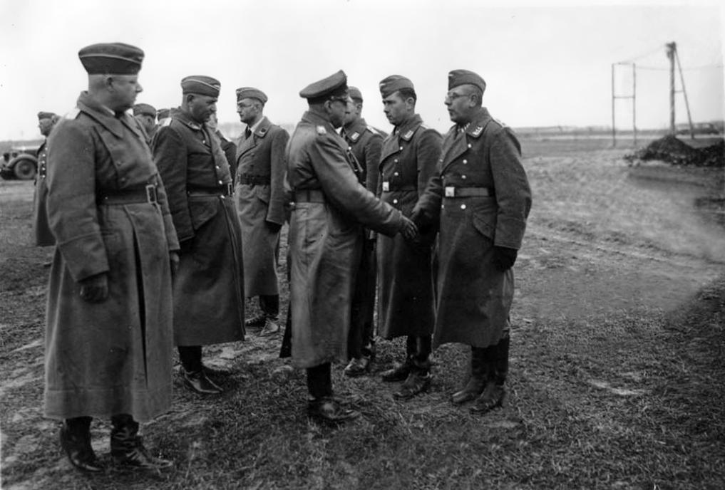 Garnizon Przasnysz, 1941r. Wizyta na lotnisku Praschnitz (Przasnysz) Generalleutnanta Hermana Brucha, towarzyszy mu Komendantur E 35/XI Praschnitz Oberst Heinrich Rauch jako Fliegevhorst